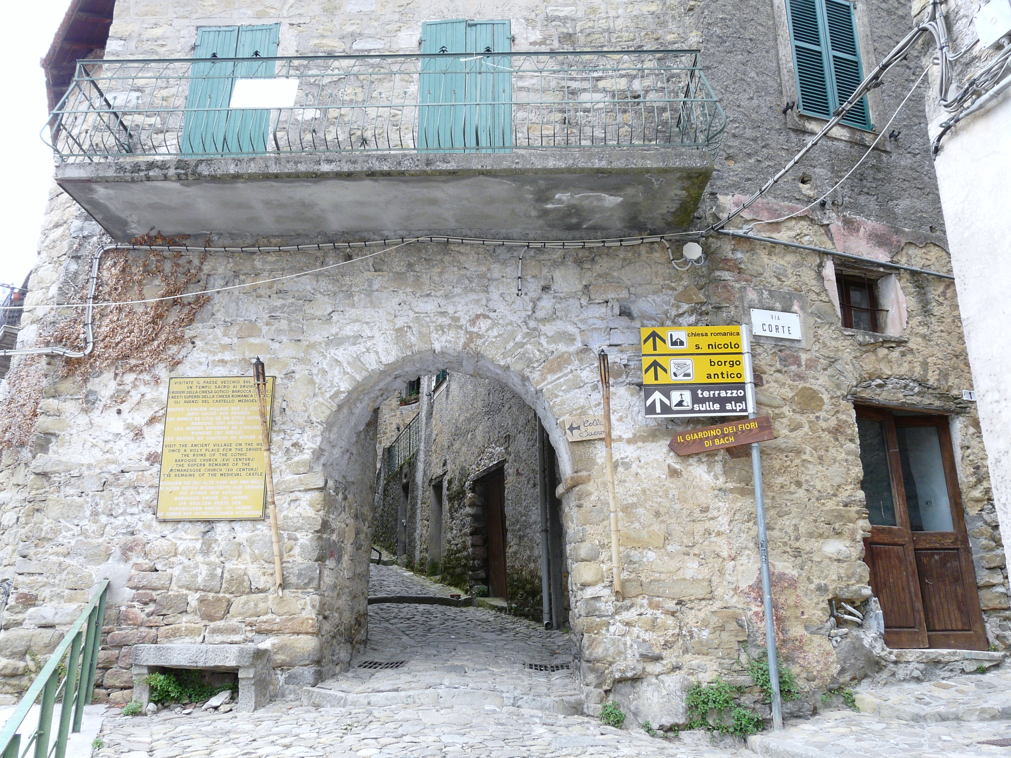 Bajardo, Liguria, Italia